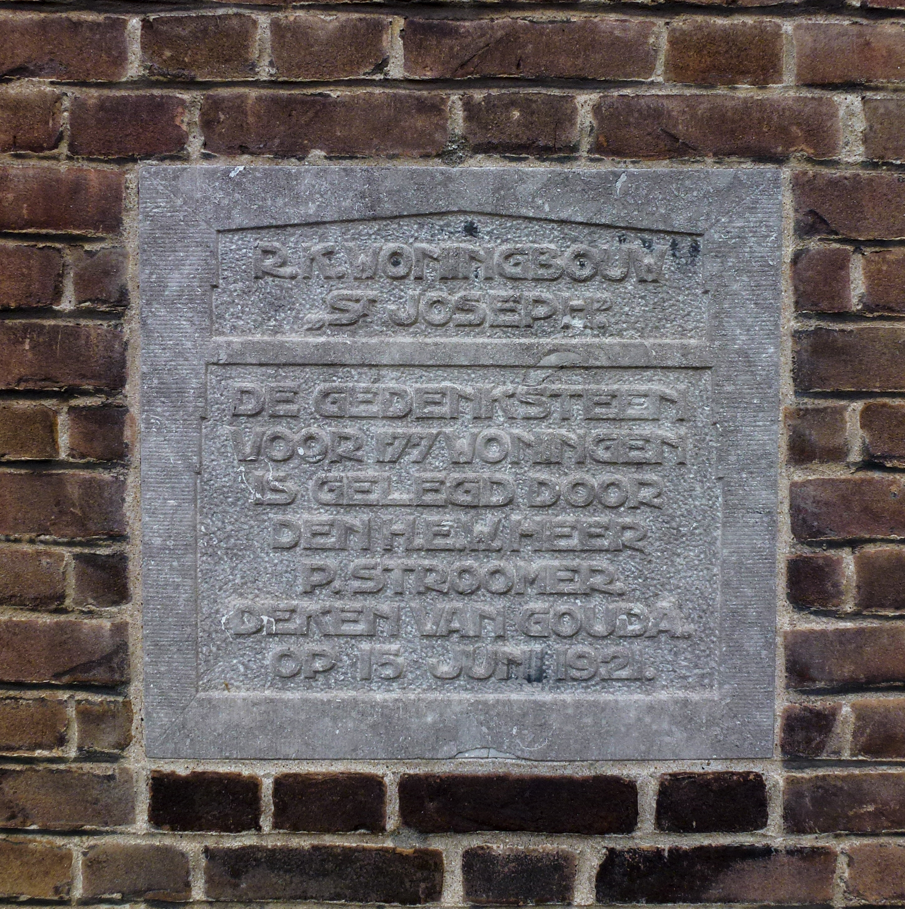 Eerste steen. De tekst is: R. K. Woningbouw St. Joseph, de gedenksteen voor 177 woningen is gelegd door den .......heer P. Stroover , deken van Gouda, op 15 juni 1921. De steen bevindt zich op het Zoutmanplein tussen nummer 15 en 16.